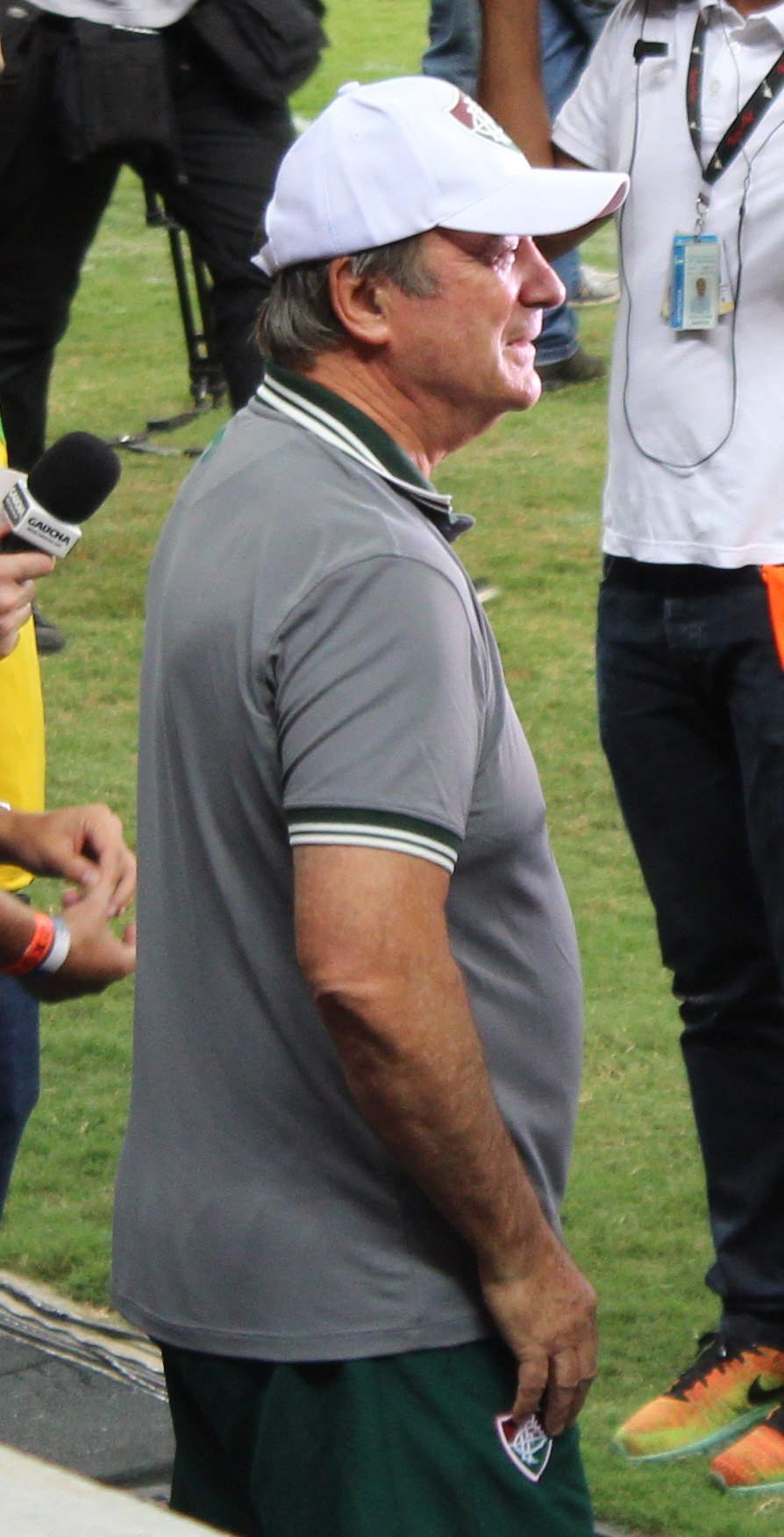 Treinador Levir Culpi na partida Fluminense x Internacional, semifinal Primeira Liga, Estádio Nacional Mané Garrincha, Brasília (DF), Brasil.